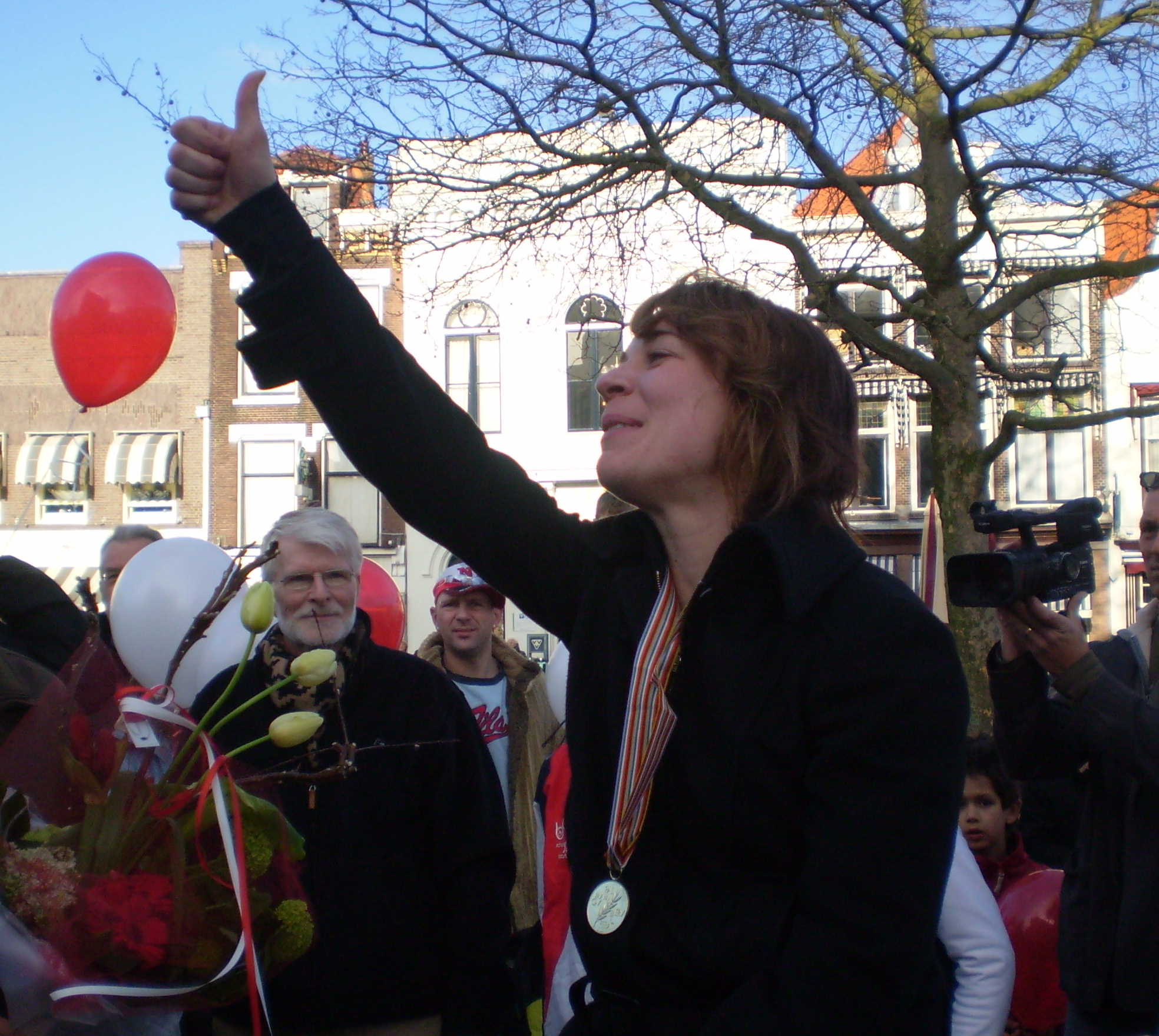 Paulien van Deutekom tijdens huldiging Gouda 2008